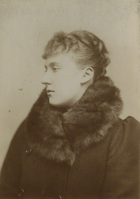 Princess Marie Louise of Schleswig-Holstein (1872-1956)